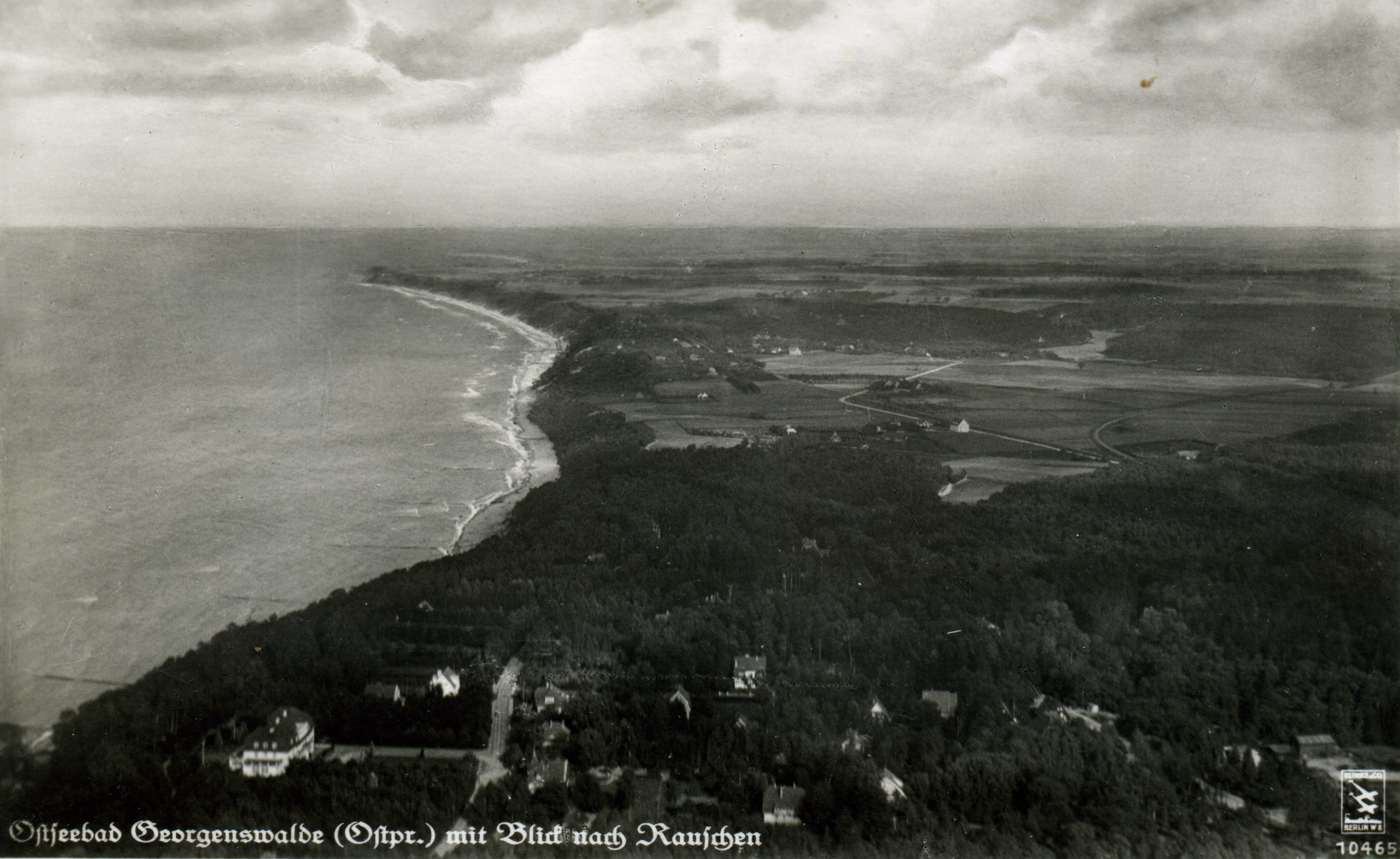 Старинная панорама Георгенсвальде, открытка начала XX века. Опубликована в книгах Светлогорск. Янтарный курорт России. / Авт.-сост. В. И. Воронов. Вильнюс: Standartu Spaustuve, 2011. — ISBN 978-9555-488-53-8 Invalid ISBN и Путешествие по Балтийскому побережью Замланда / Авт.-сост. В. И. Воронов; пер. с нем. Е. Мингалевой. — Калининград, 2009. — ISBN 978-9955-488-37-8. С. 83-85.